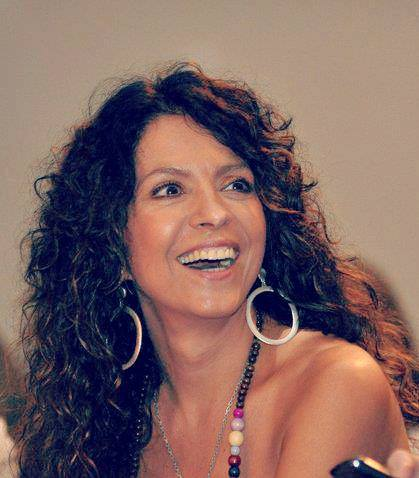 cada sonrisa de ella es un angel mas que nos cuida y nos protege